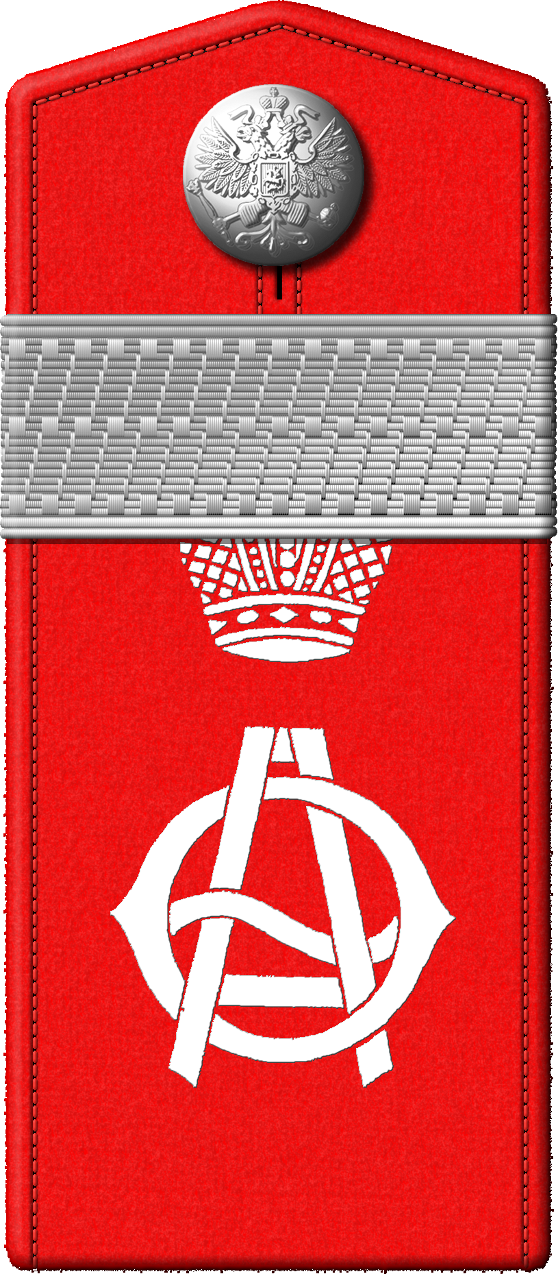 Российская Империя: Российская Императорская армия Род войск/служба: армейская кавалерия. Воинские части: 5-й гусарский Александрийский Её Величества Государыни Императрицы Александры Фёдоровны полк (знаки различия: погоны повседневные по состоянию на 1908-1917 г. ). Крымский конный императрицы Александры Федоровны полк (знаки различия: погоны повседневные по состоянию на 1909-1917 г.) Чины/звания: Вахмистр. Первичные источники: Приказ по военному ведомству № 155 от 29 марта 1908 г.